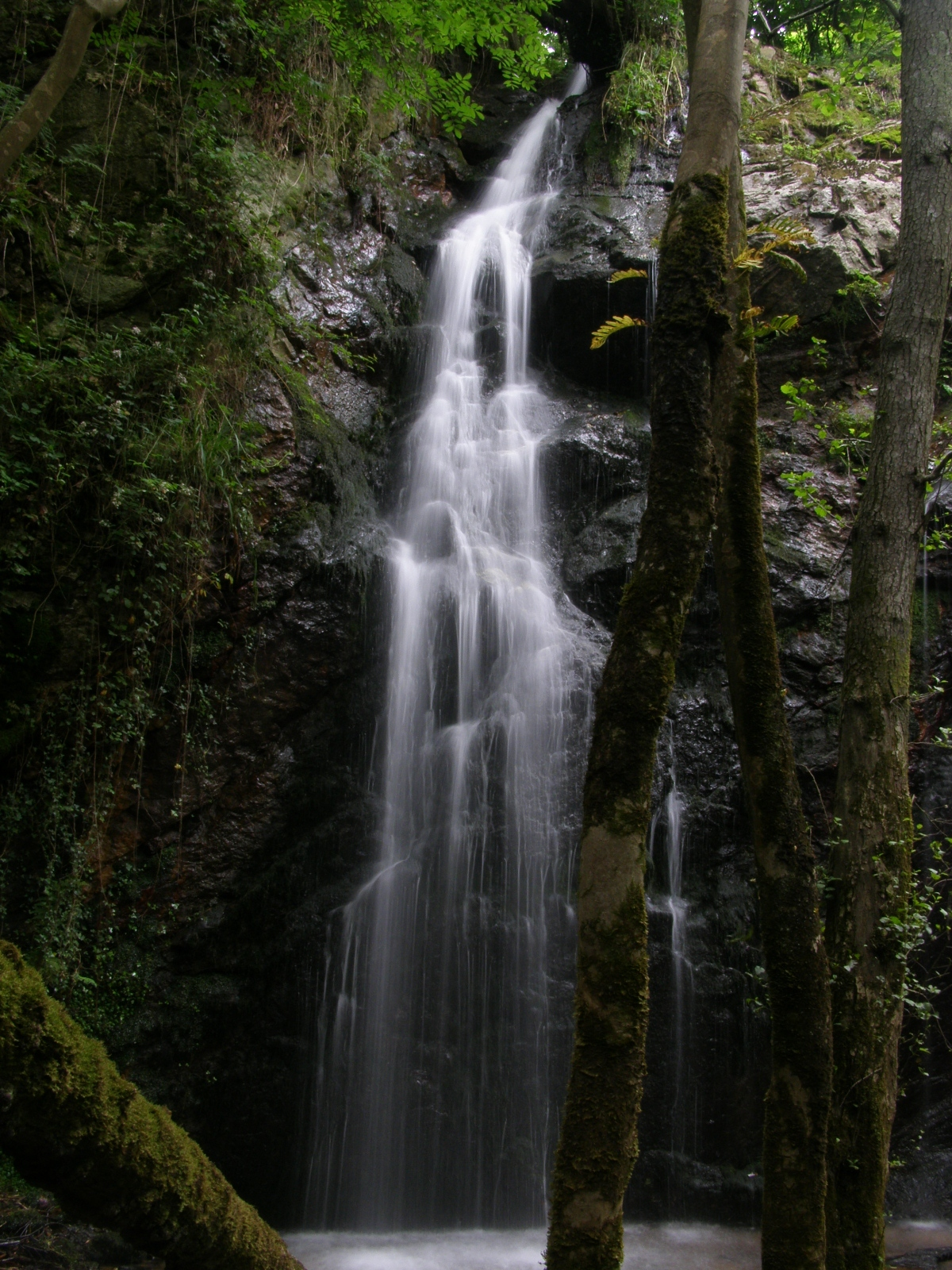 Cascada del Buanga en Trubia (Asturias)